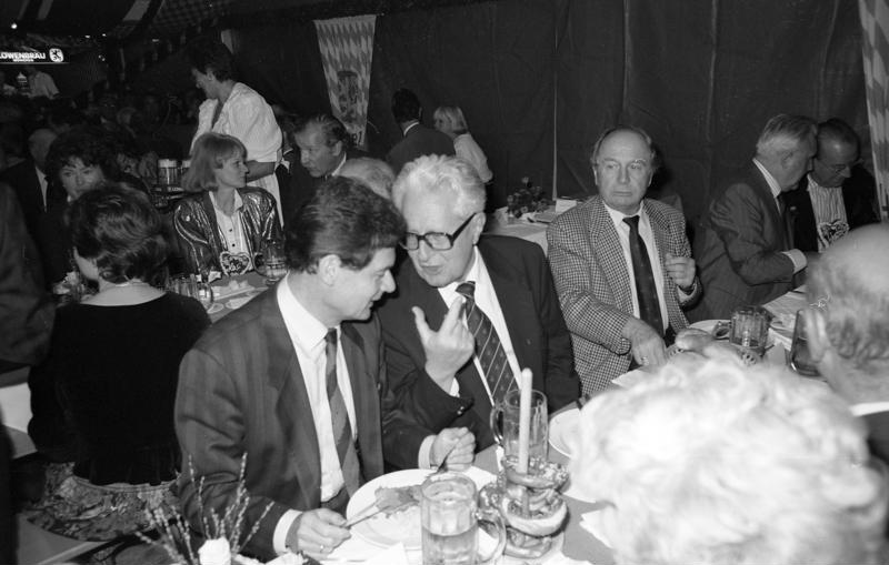 13.9.1990 Oktoberfest in der bayerischen Landesvertretung